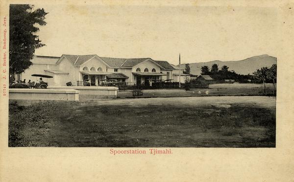 Spoorstation Tjimahi